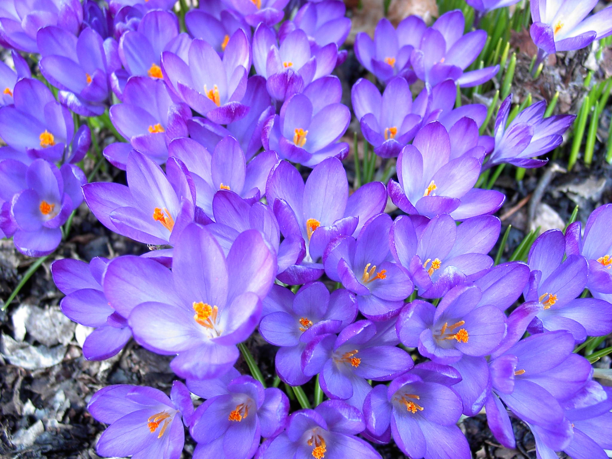 Bloeiende krokussen.